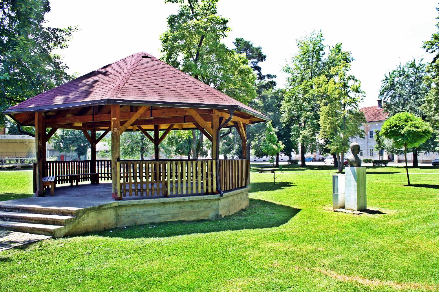 Park u Otočcu